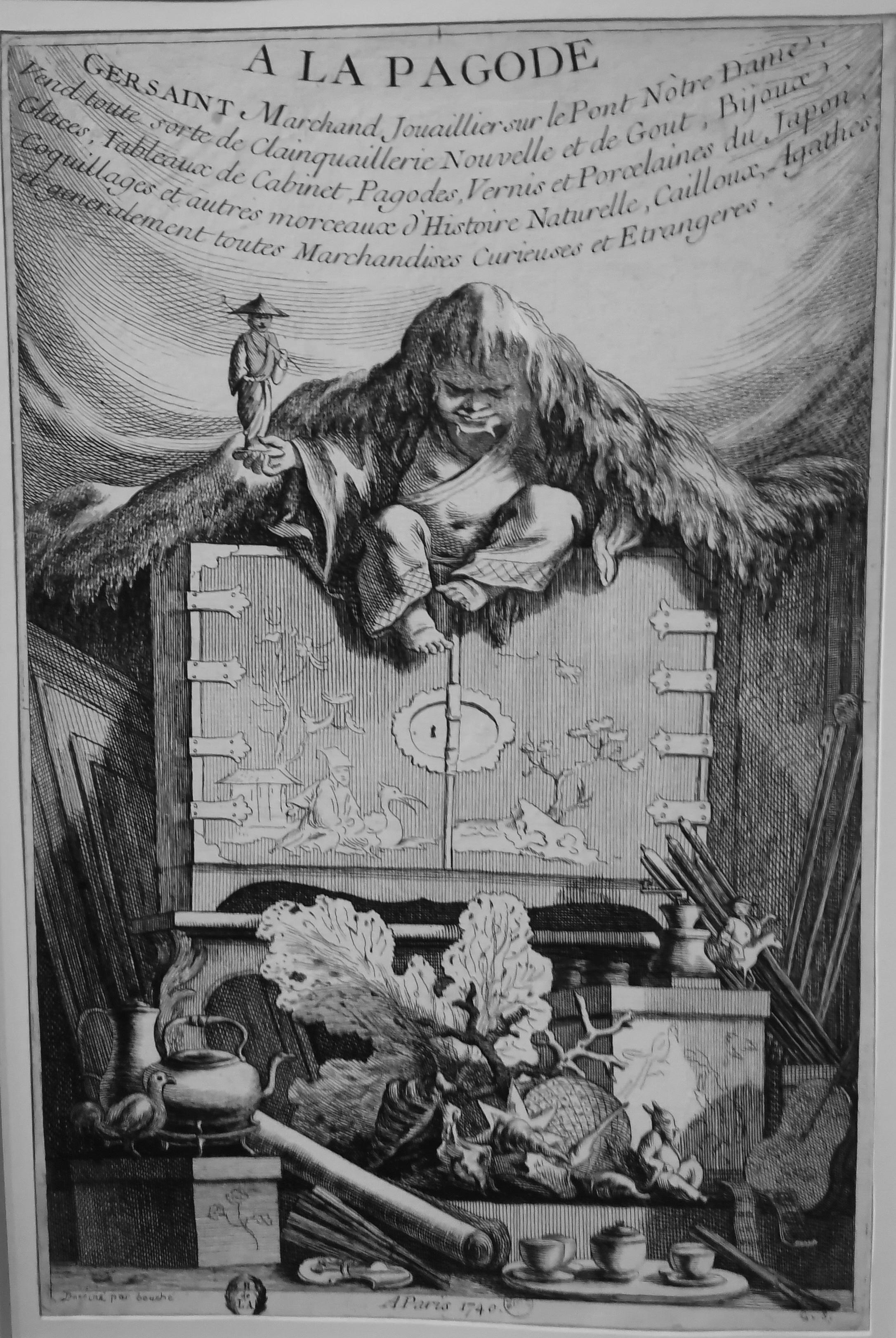 Gravure de Boucher pour le marchand Guersaint, d'objets chinois